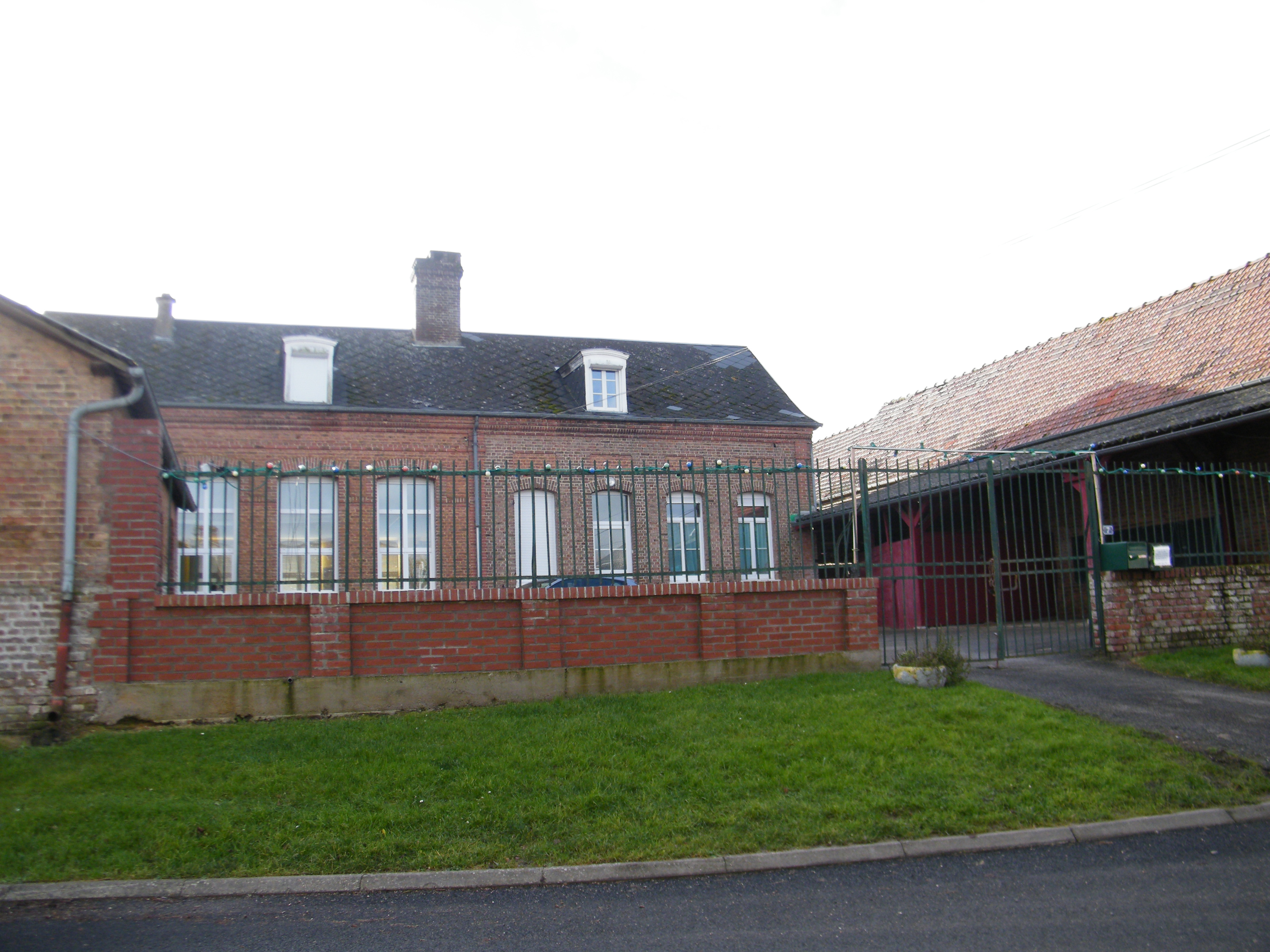 Vismes, Somme, Fr, école.